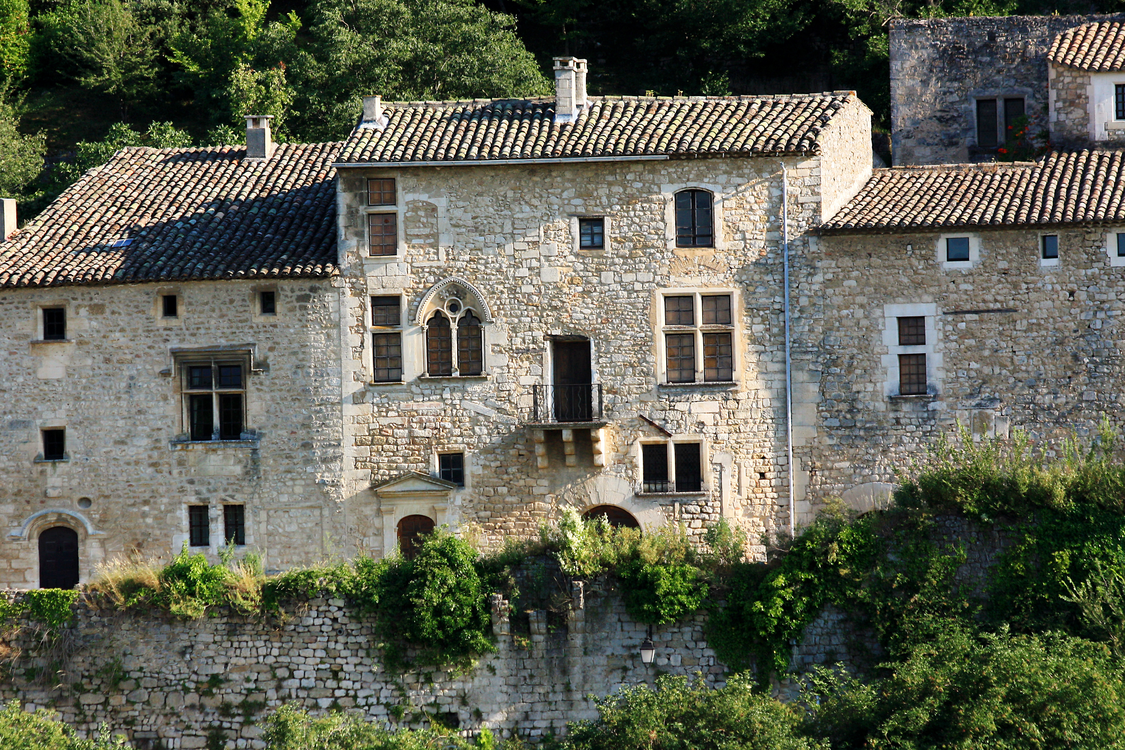 Ensemble de maison dont la datation varie entre le XIVème et le XVIème siècle (MH) à Oppède-le-Vieux